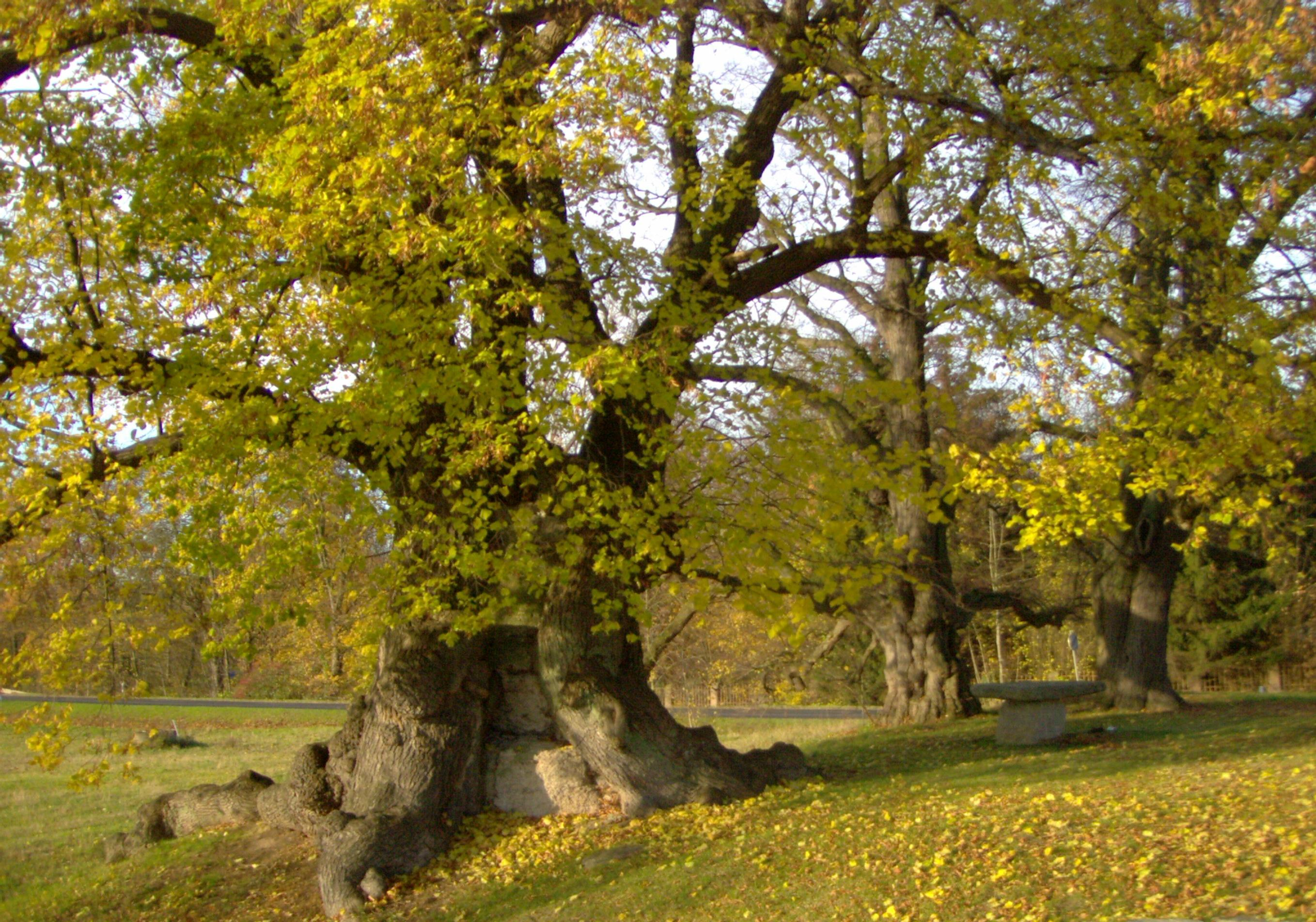 Die Mahllinden bei Oberdorla: Alte Gerichtslinden bei Mühlhausen (Thüringen) im November 2006.